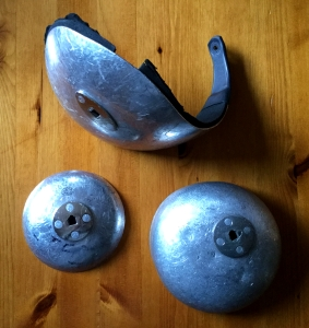 (Top) Gard sabr (Chwith) Gabr ffwyl (Dde) Gard cleddyf blaenbwl